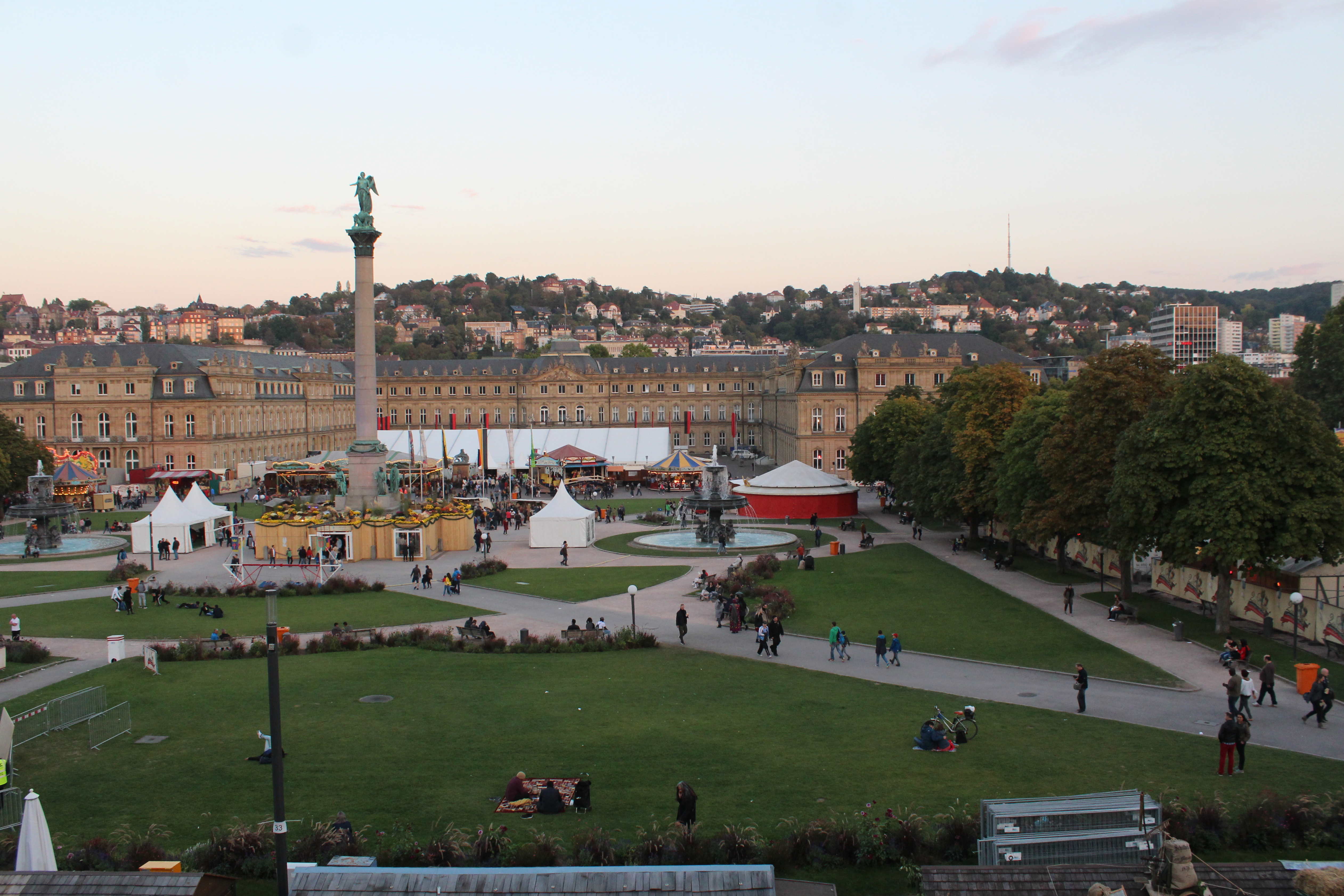 Historisches Volksfest Stuttgart 2018, fotografiert vom Riesenrad